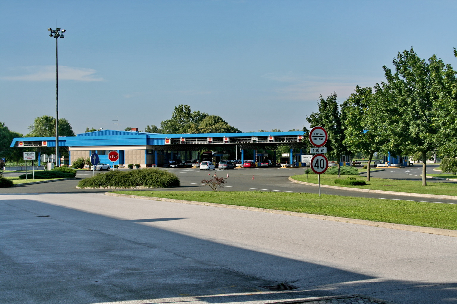 Granični prijelaz Goričan/Letenye (HR/H)